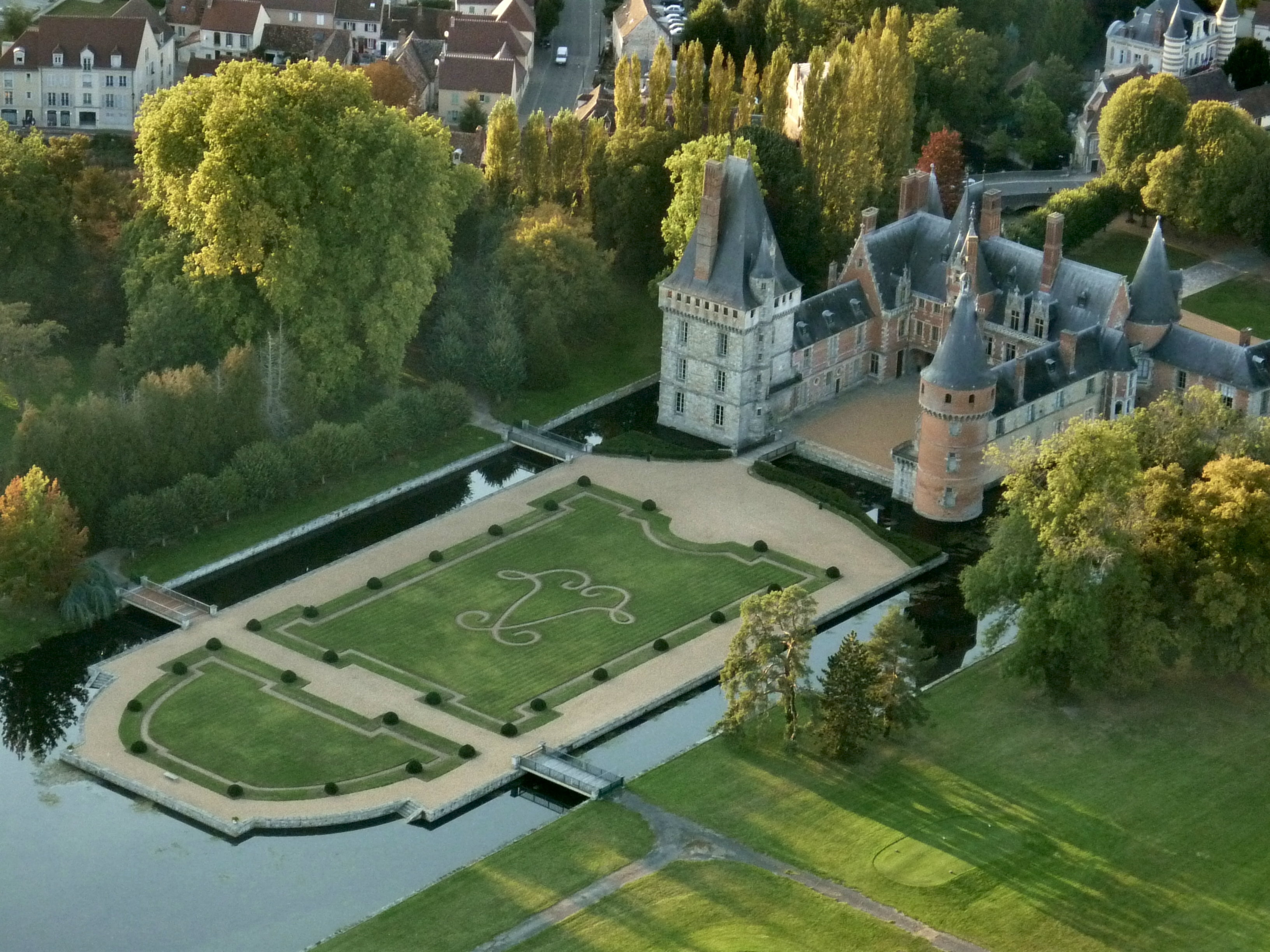 château de Maintenon, Eure-et-Loir (France).